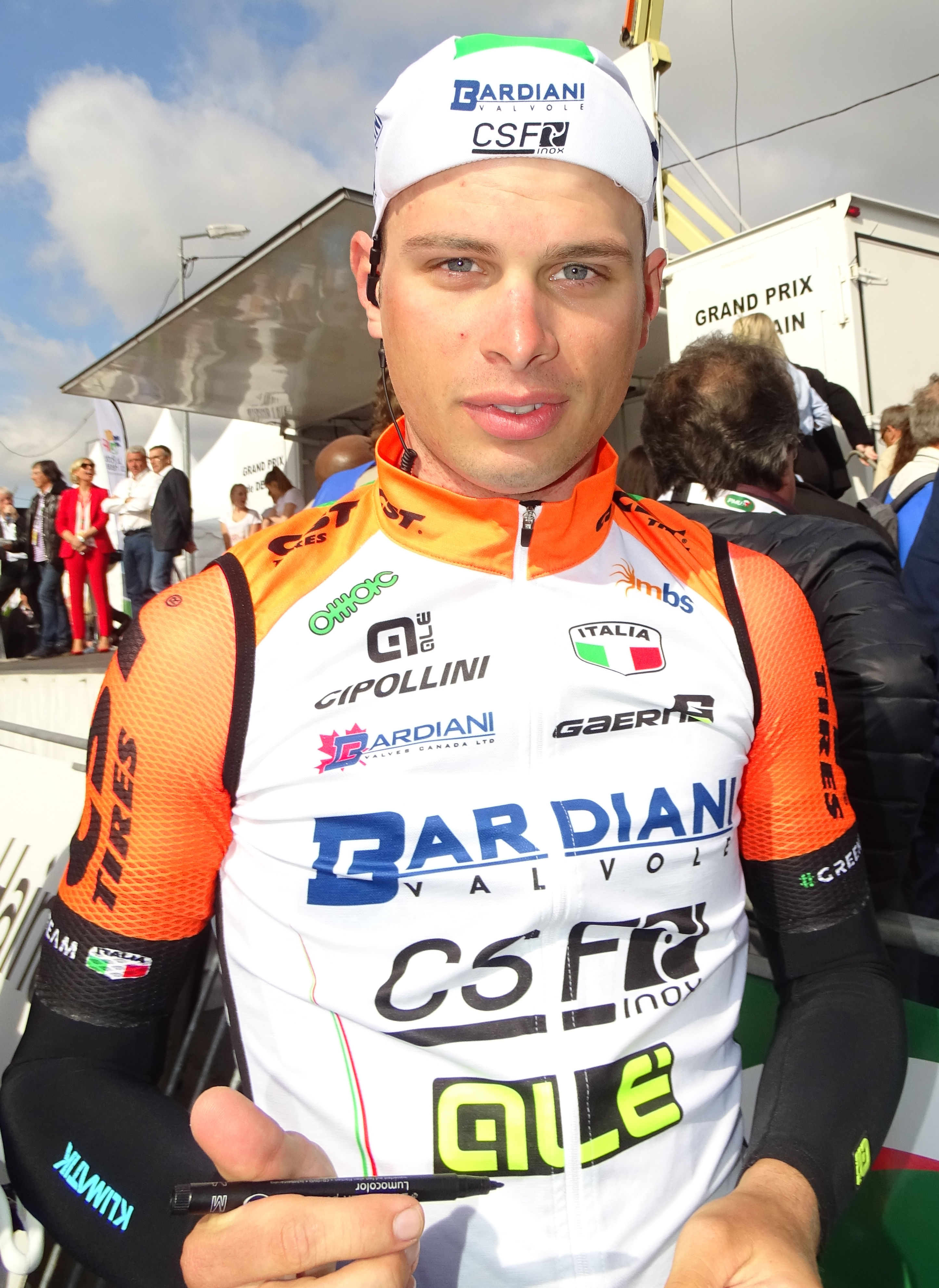 Reportage réalisé le jeudi 13 avril à l'occasion du départ et de l'arrivée du Grand Prix de Denain 2017 à Denain, Nord, Nord-Pas-de-Calais-Picardie, France.